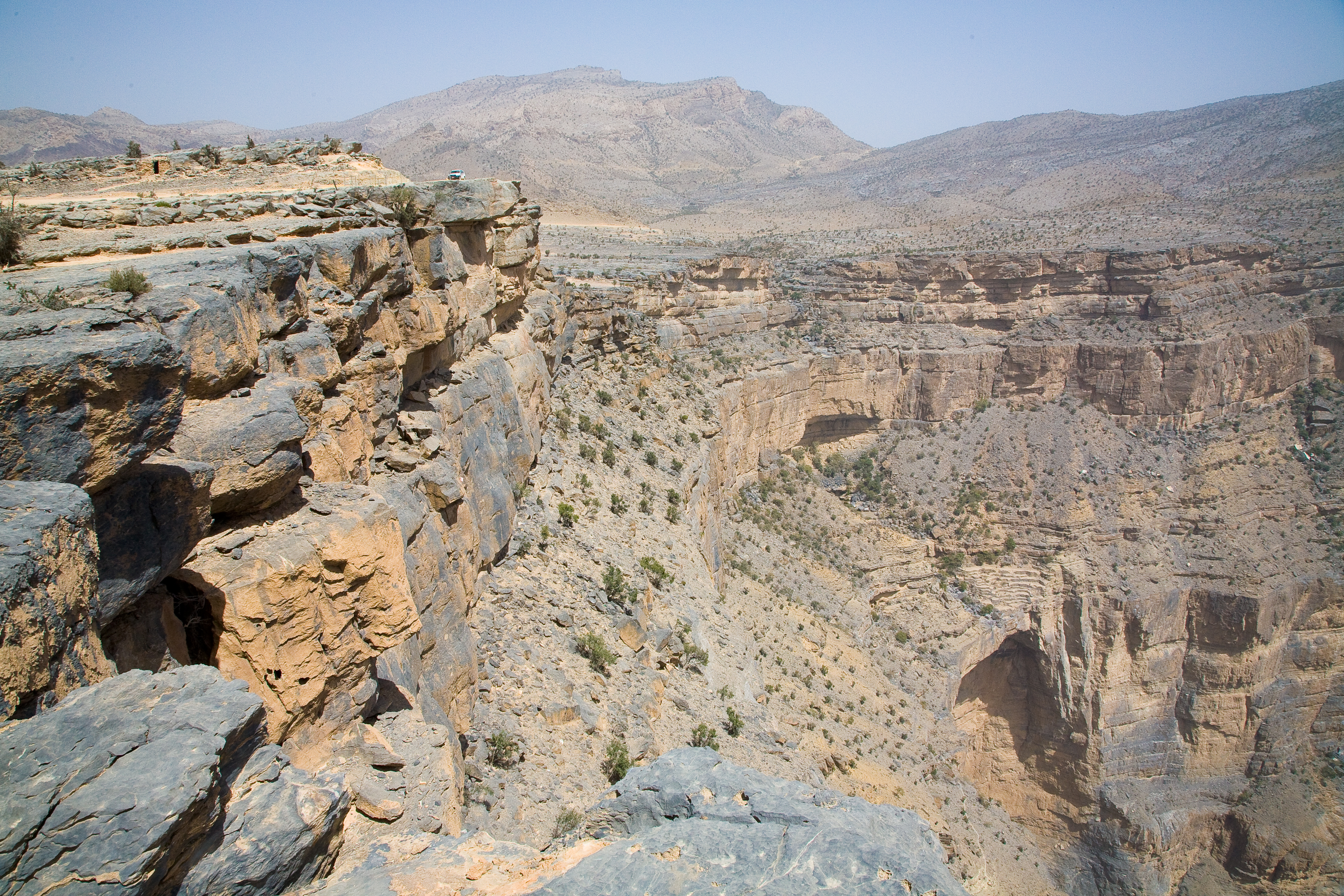 Jebel Shams, Oman